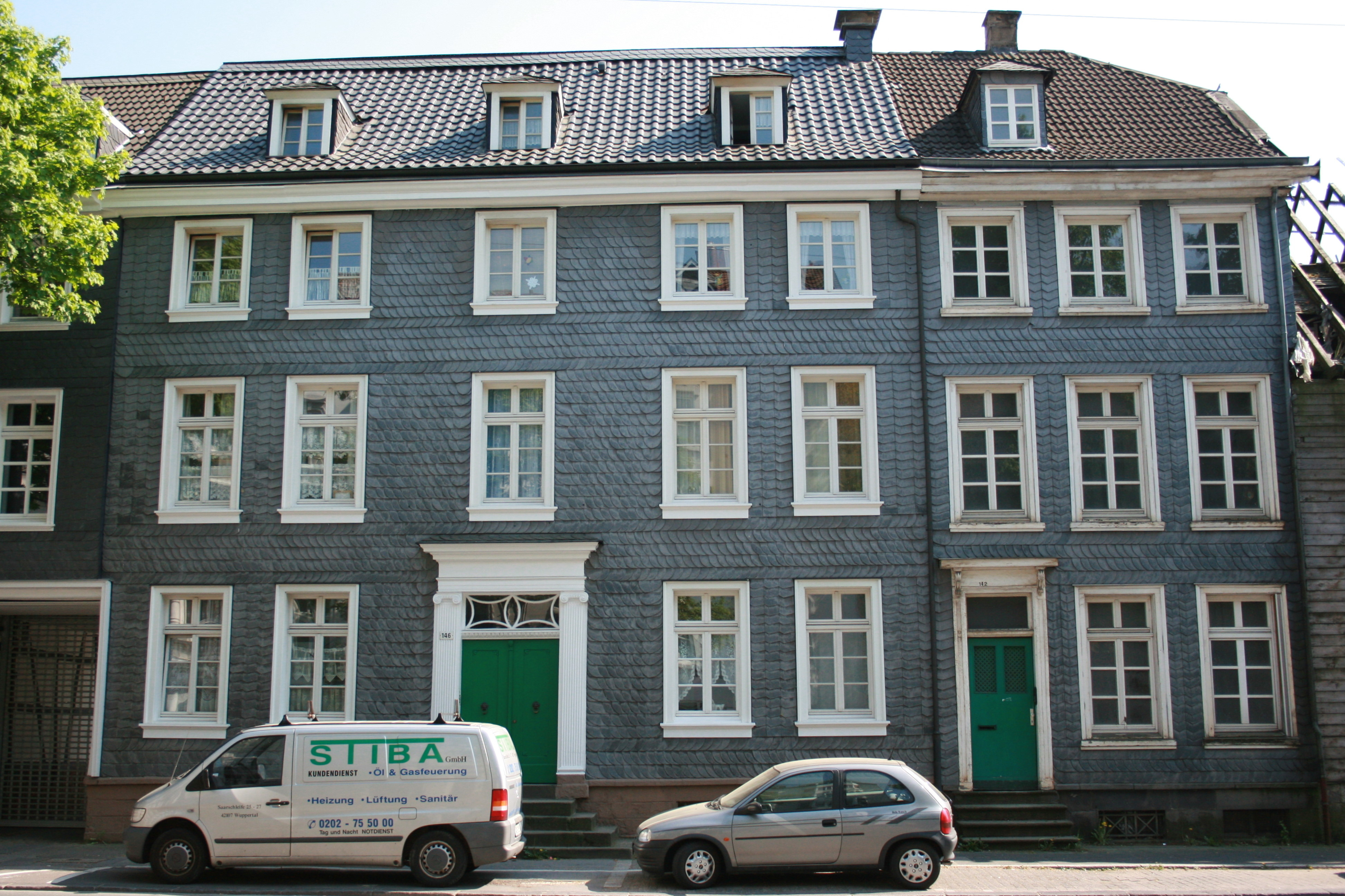 Friedrich-Engels-Allee 142 und 146 in Wuppertal